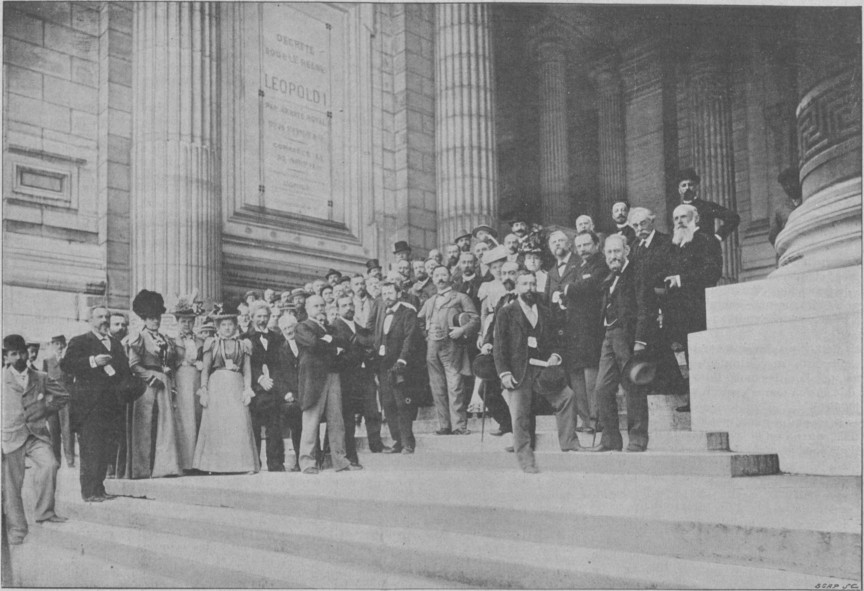 "Belgique - Le congrès des architectes (Photographie communiquée par notre correspondant de Bruxelles)". Le congrès des architectes français (organisé par la Société centrale des architectes français) est reçu au Palais de Justice de Bruxelles par la Société centrale d'architecture de Belgique.